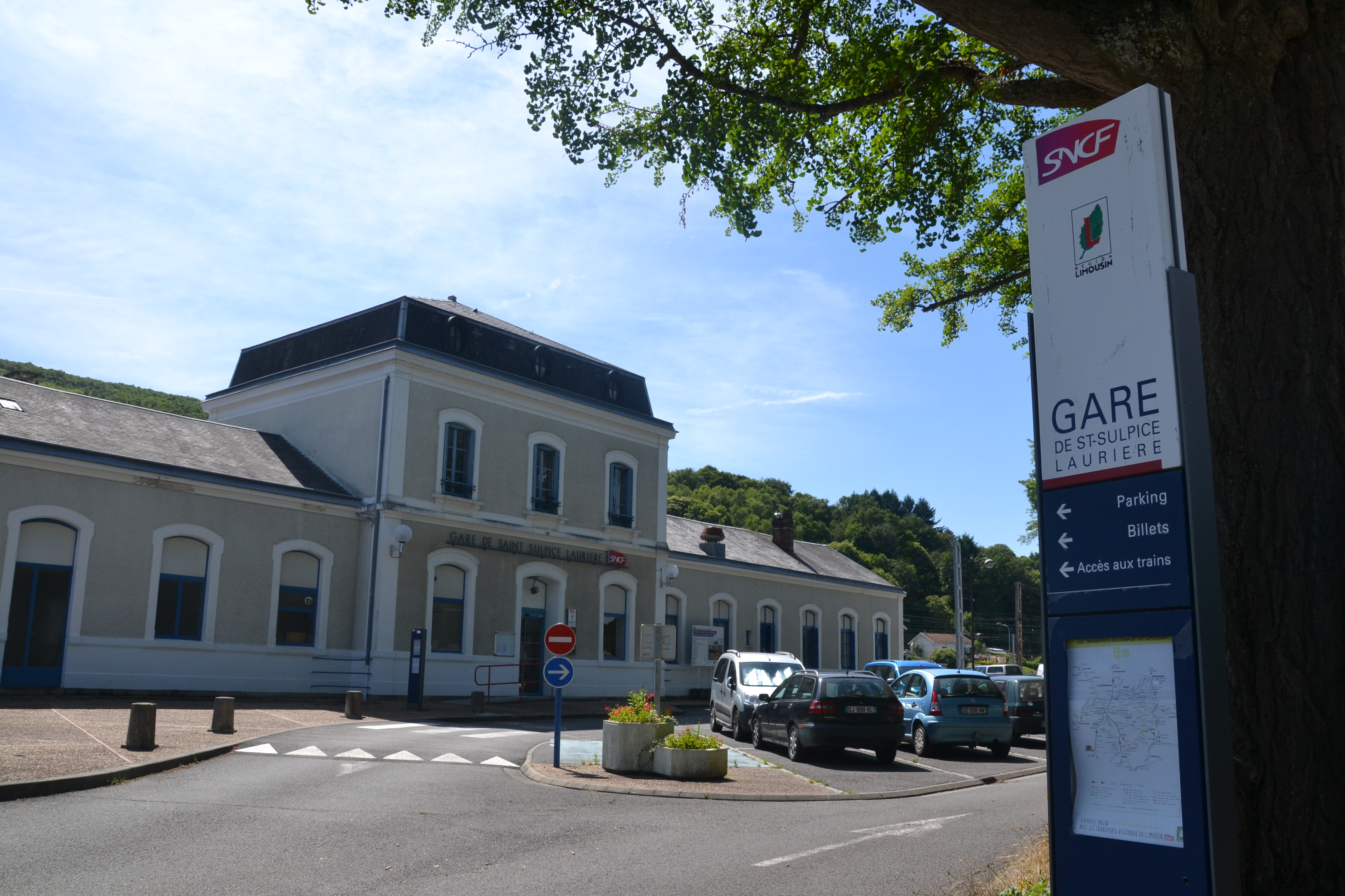 Gare de Saint-Sulpice-Laurière (Haute-Vienne, France).